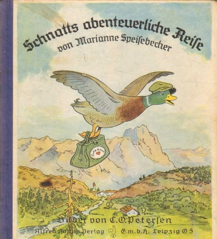 Marianne_Speisebecher: Schnatts abenteuerliche Reise. Mit Bildern von Carl Olof Petersen, Leipzig, Alfred Hahns Verlag, ca. 1930)